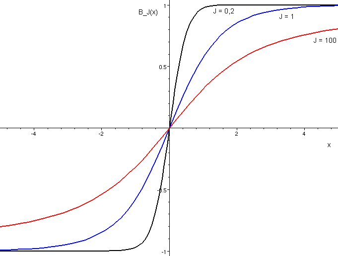 Brillouin-Funktion für drei verschiedene Werte von J